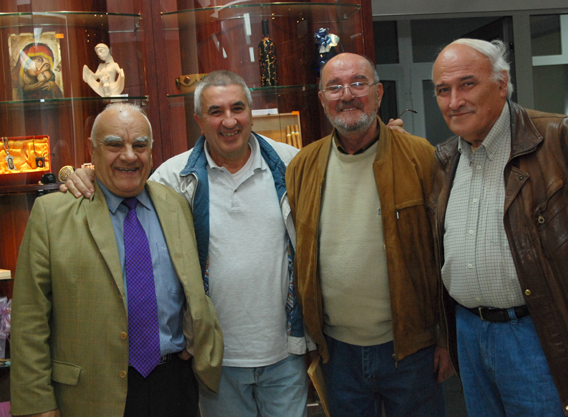 Любен Генов, Иван Григоров, Евгений Станчев и Коста Филипов на премиера на книга за в. "Поглед".